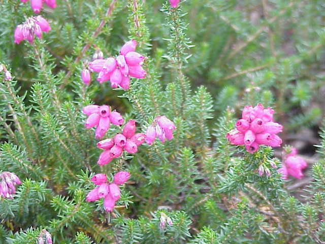 Species: Erica cinera Family: Ericaceae Image No. 1